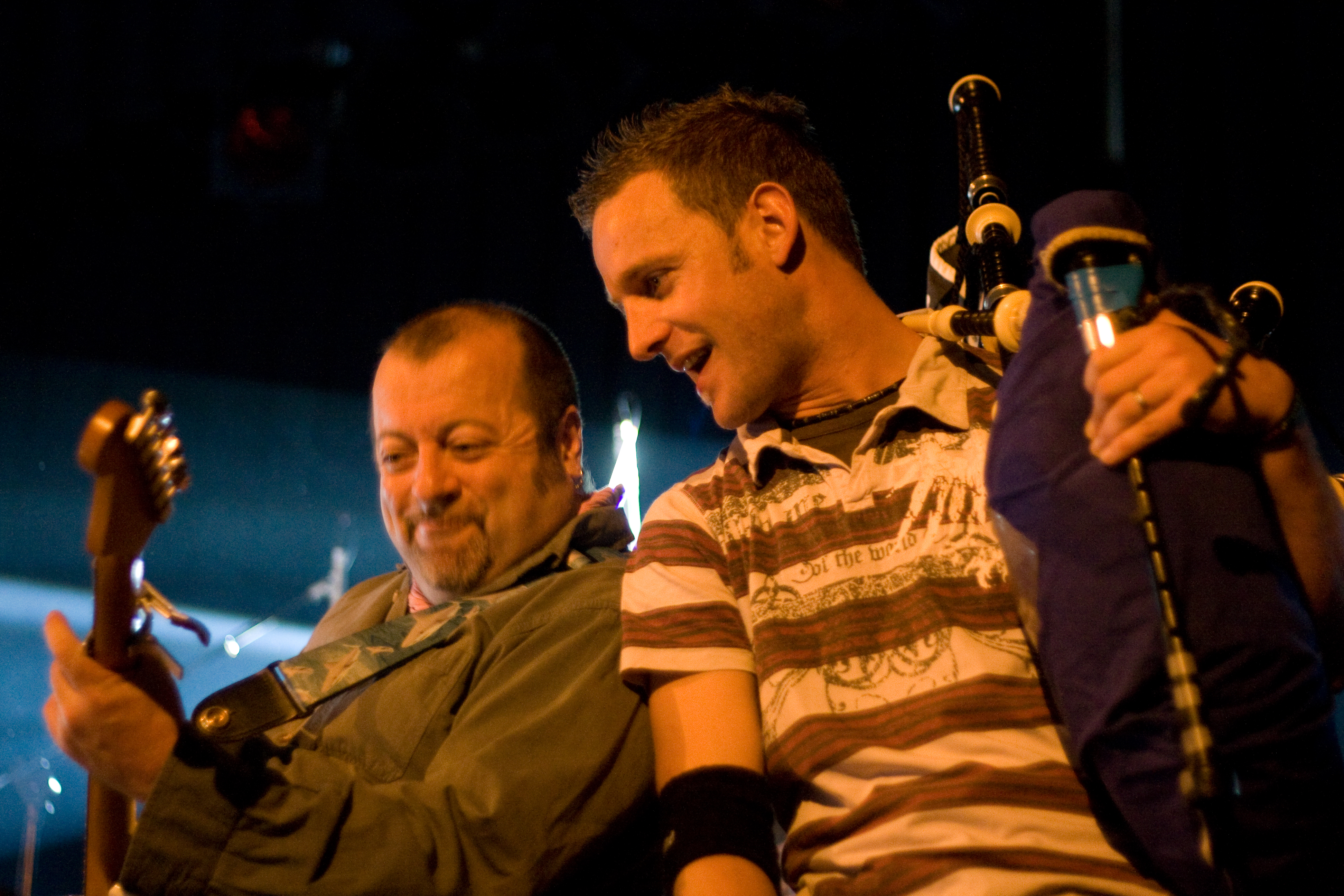 Concert de Soldat Louis, à Monthey.